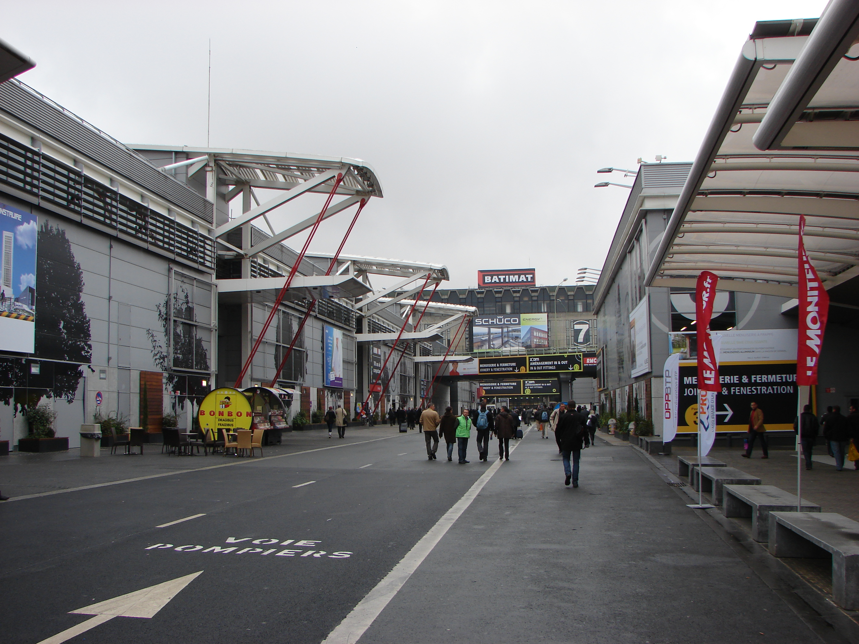 Vue extérieure du Parc des expositions de la porte de Versailles lors du salon Batimat 2011.